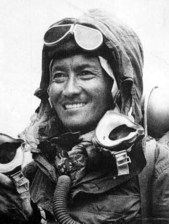 Tenzing Norgay, 1953